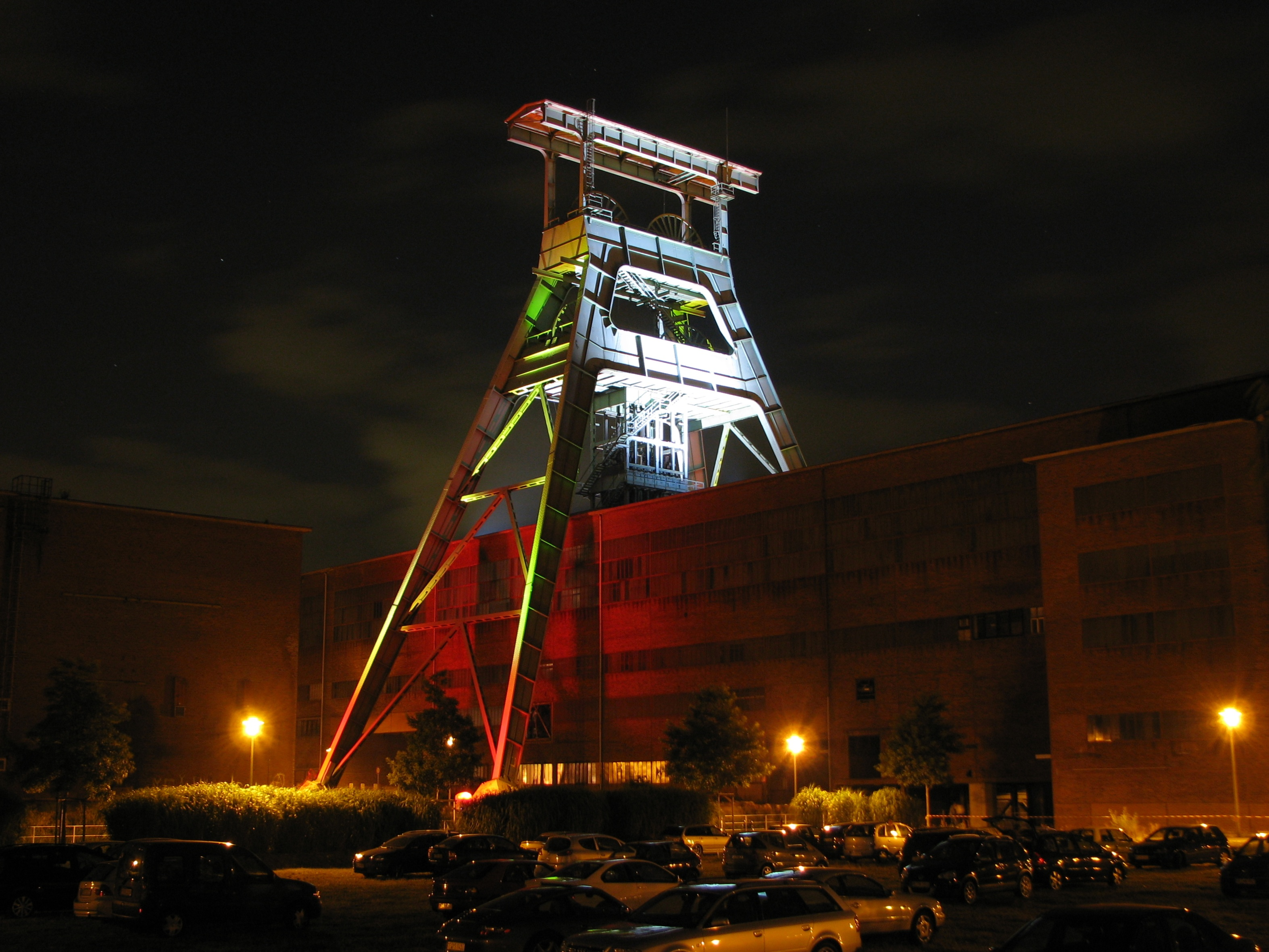 Zeche Ewald während der Nacht der Industriekultur am 21.06.2008